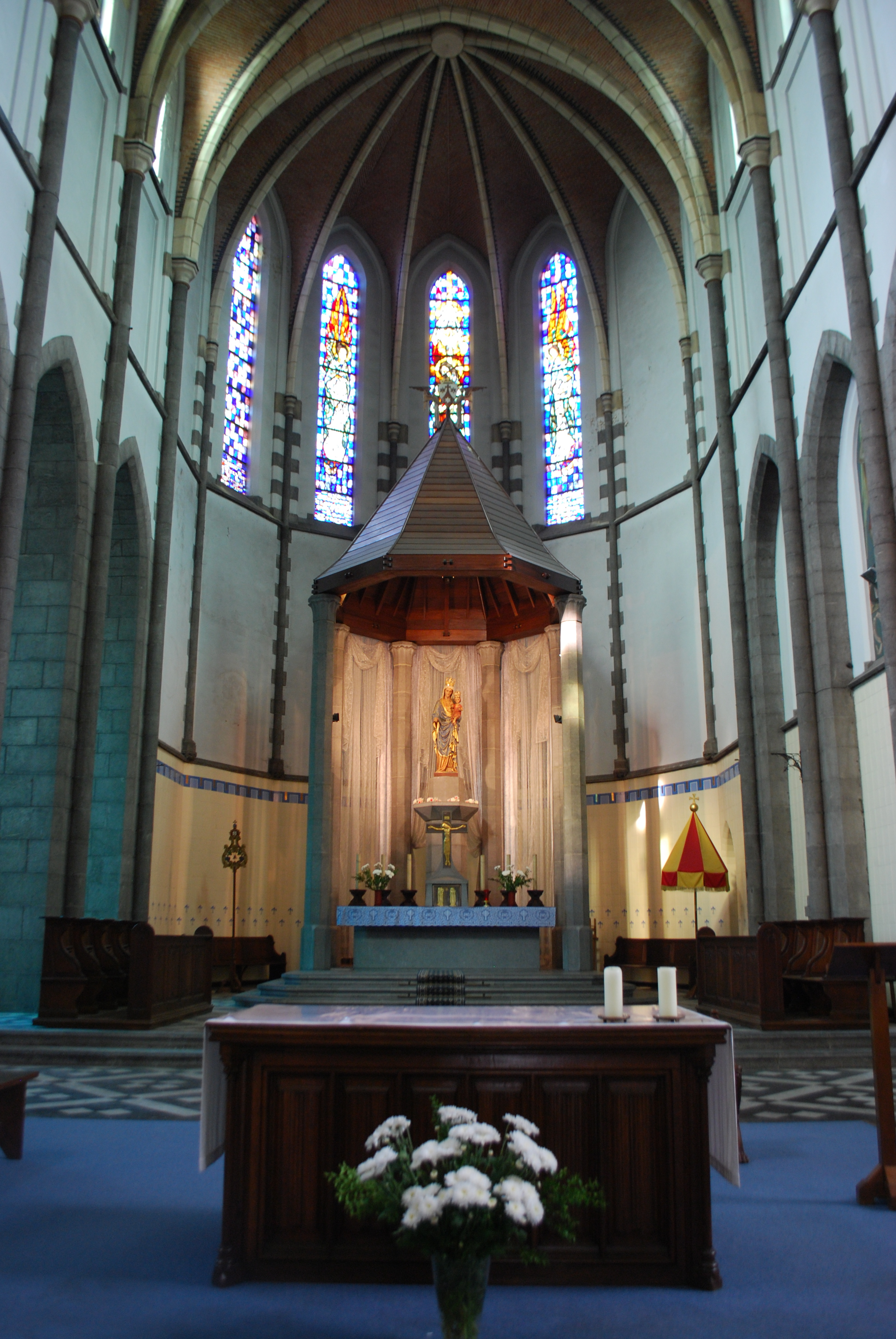 Vue intérieure de la basilique Notre-Dame de Chèvremont, à Chaudfontaine.